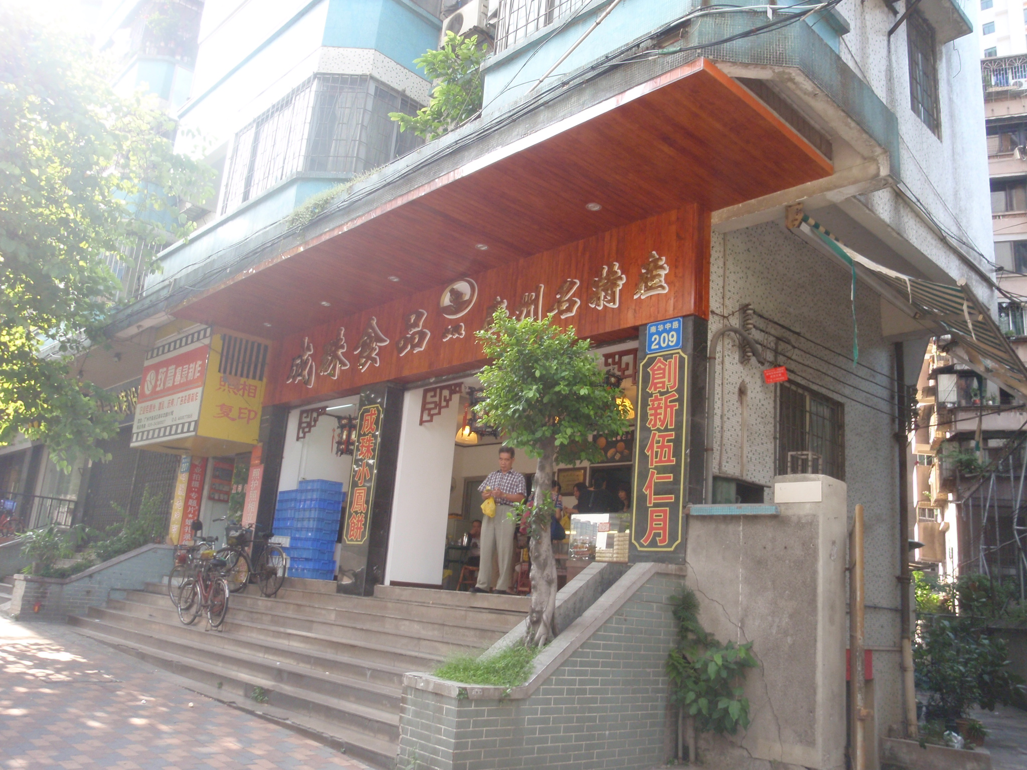 粵語: 廣州 成珠餅家舖面